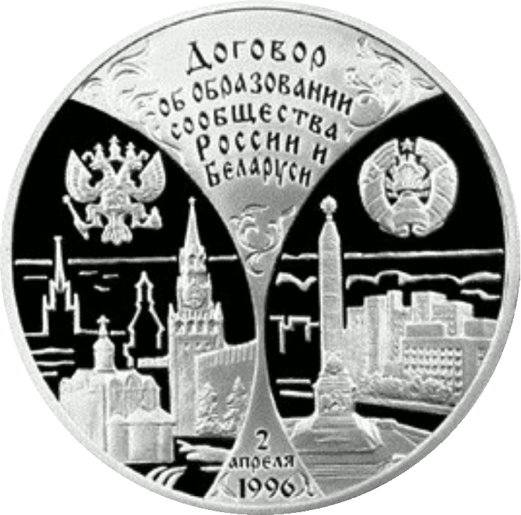 Монета Банка России — Серия: «Международные отношения», Первая годовщина договора об образовании сообщества России и Беларуси, 3 рубля реверс